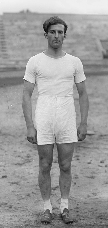 [Stade Pershing, athlètes du 400 m haies, de gauche à droite, Antony] Jarrety, [Albert] Lucas, Duthil : [photographie de presse] / [Agence Rol]